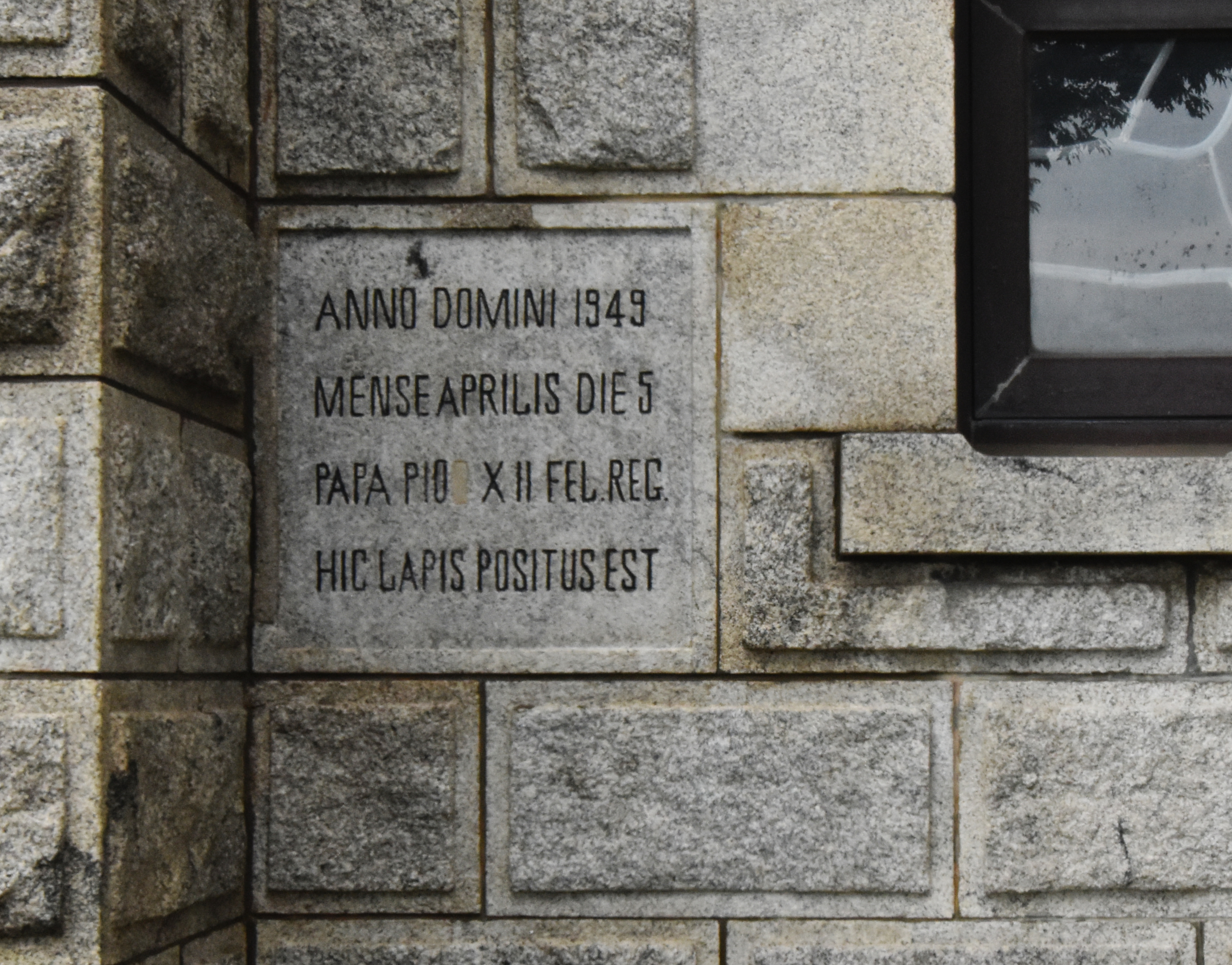 춘천 죽림동 주교좌성당